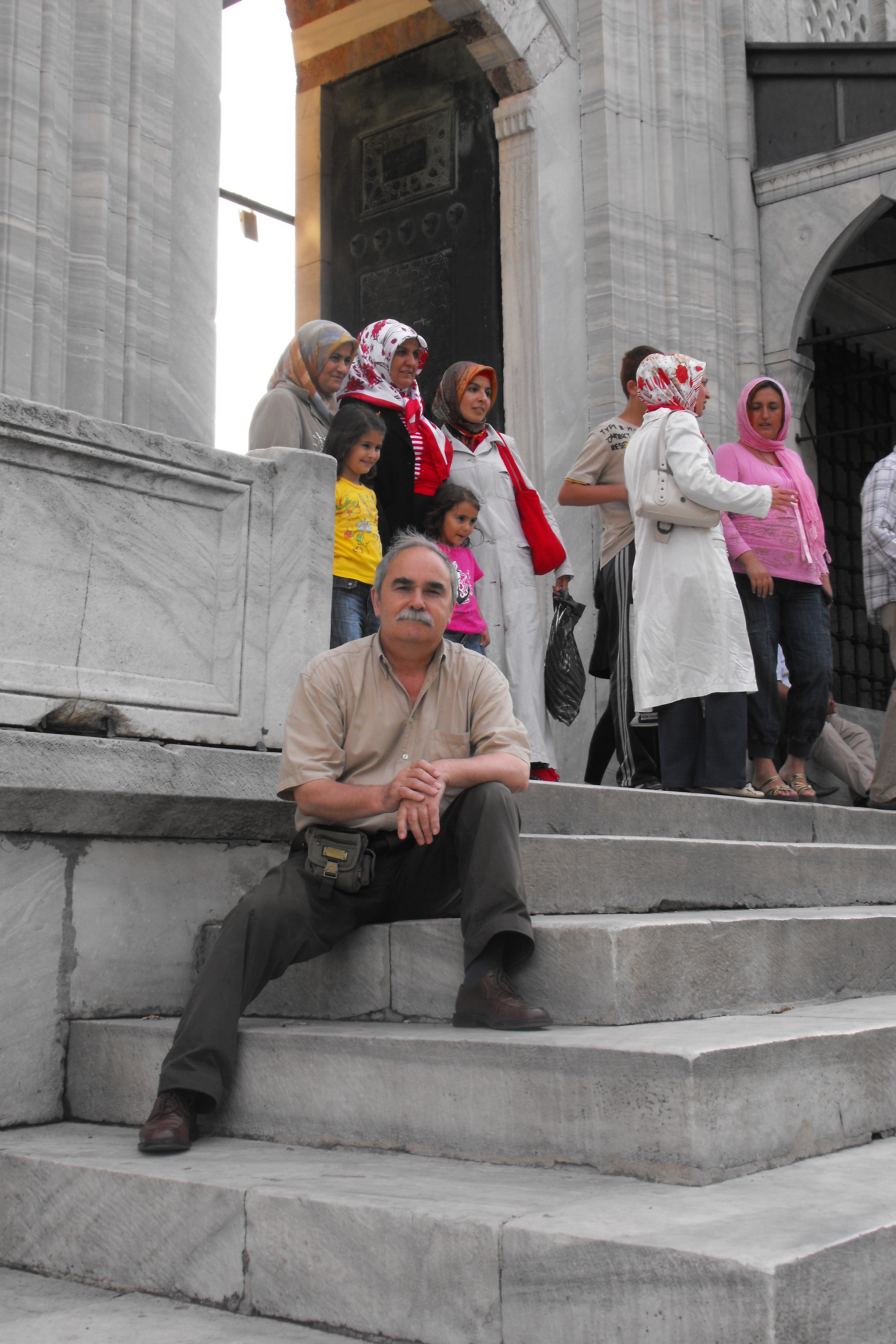 Michał Mońko w swoim ukochanym Stambule.